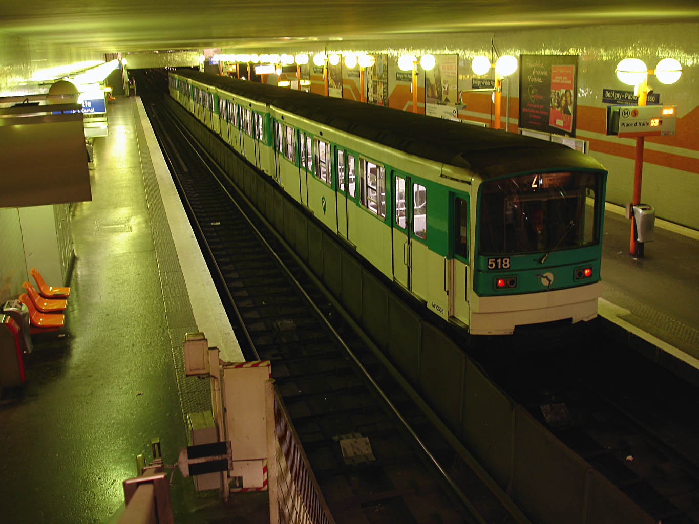 Métro de Paris (France) - ligne 5 - Station Bobigny - Pablo Picasso